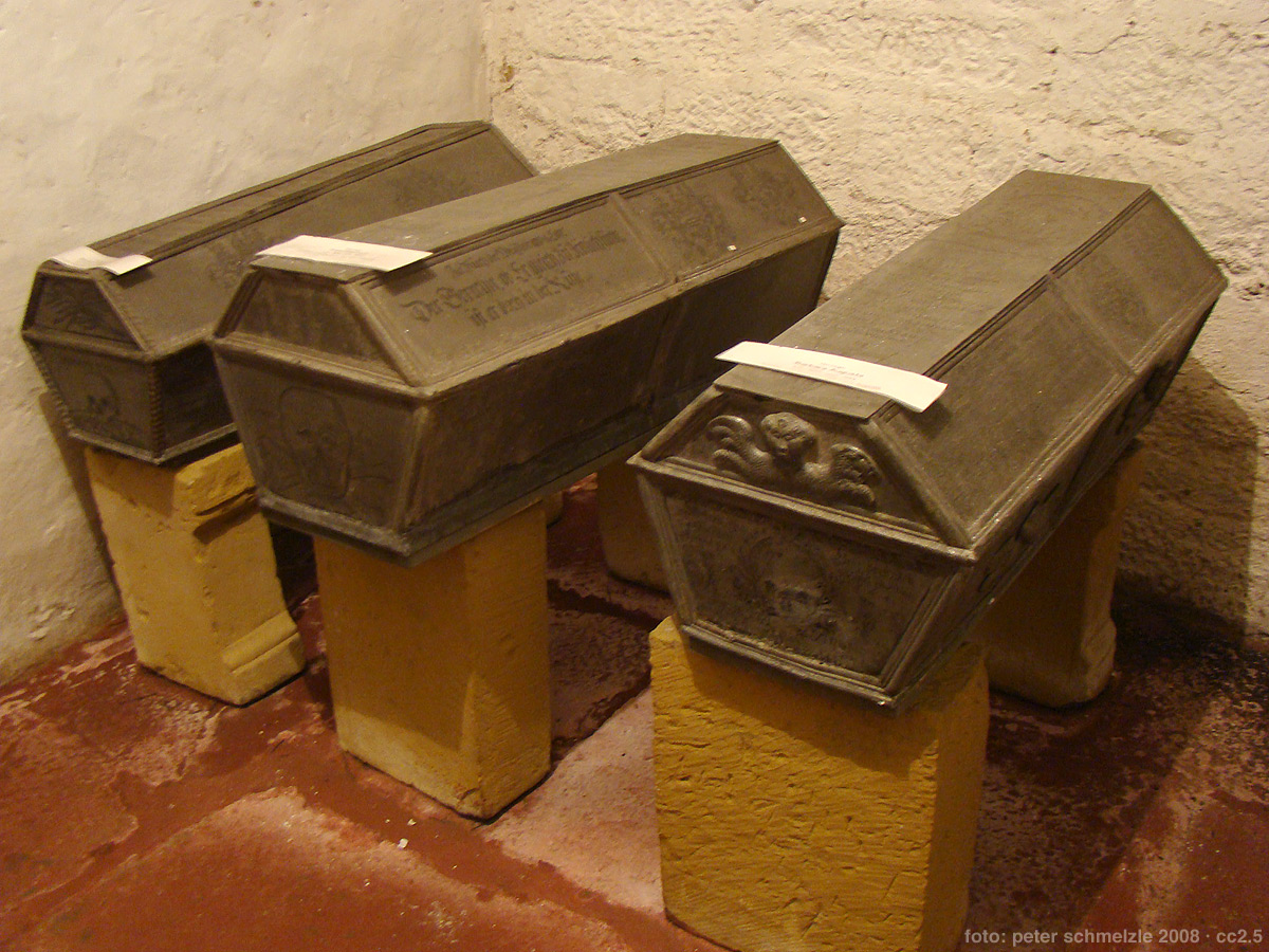 Kindersarkophage dreier früh verstorbener Töchter Herzog Friedrichs von Württemberg-Neuenstadt (Elisabeth † 1666, Anna † 1670 und Barbara † 1664) in der Gruft der Nikolauskirche in Neuenstadt am Kocher